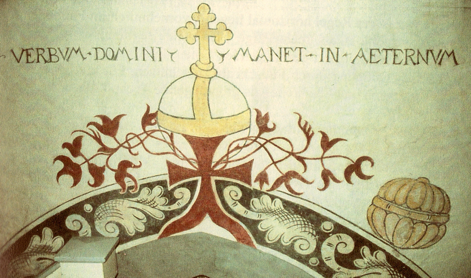 Evangelische Kirche St. Laurentius in Dassel, Niedersachsen, Deutschland - Weihekreuz von 1477